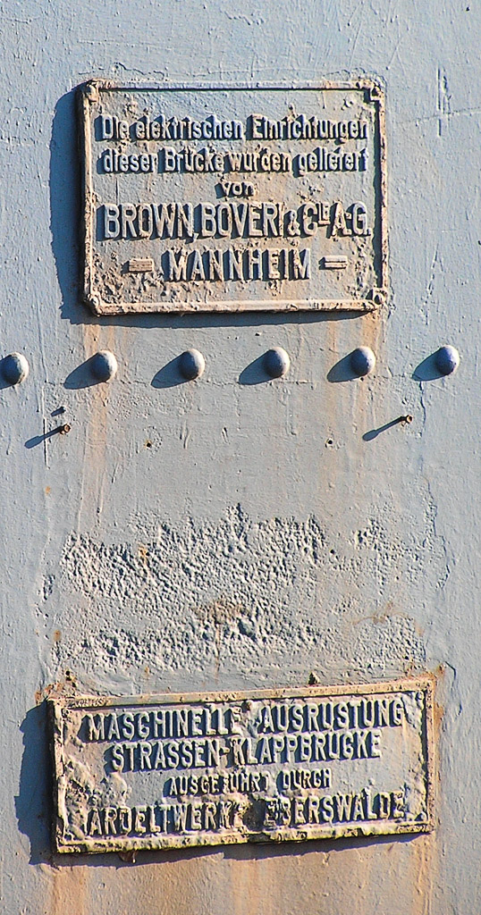 Beschreibung: Schilder der Ziegelgrabenbrücke / mittig angebracht Fotograf: Darkone, 1. April 2005